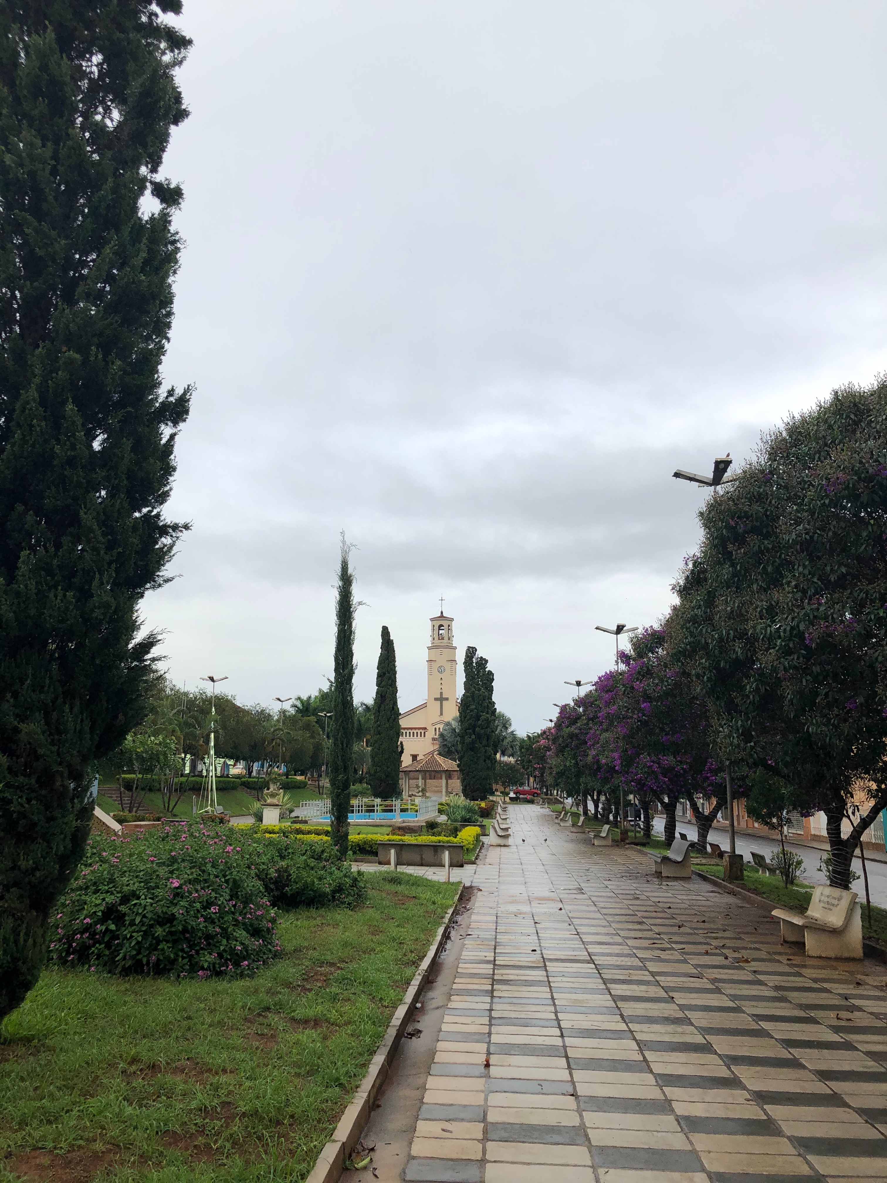 Scenes from Paraguaçu, Minas Gerais